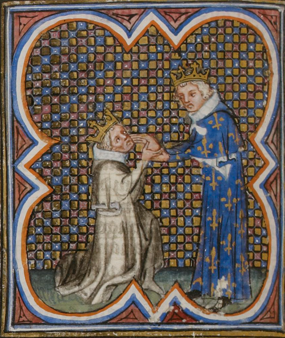 Charles V recevant les possessions de Charles le Mauvais à Vernon en 1378.